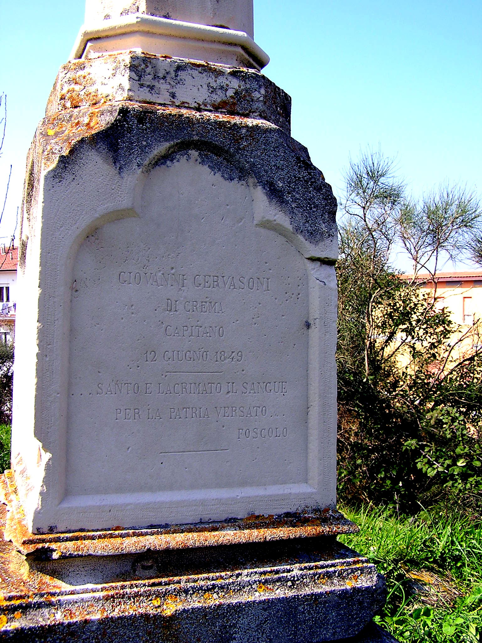 Monumento di Monte Marino ad Ancona, eretto in ricordo dell'assedio austriaco del 1849 - iscrizione a Giovanni Gervasoni